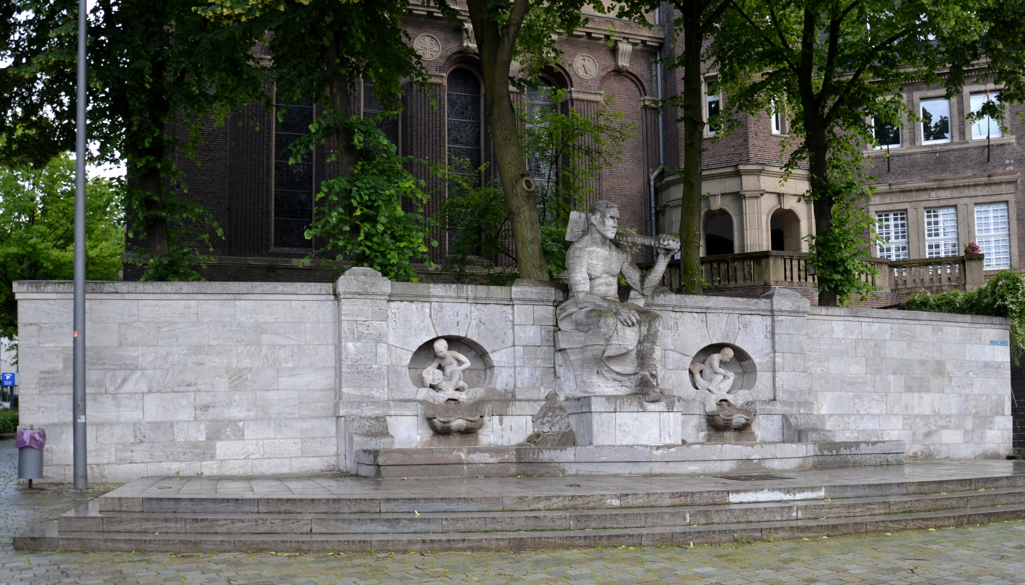 Jahrhundertbrunnen in Essen, erbaut 1907, unter Denkmalschutz